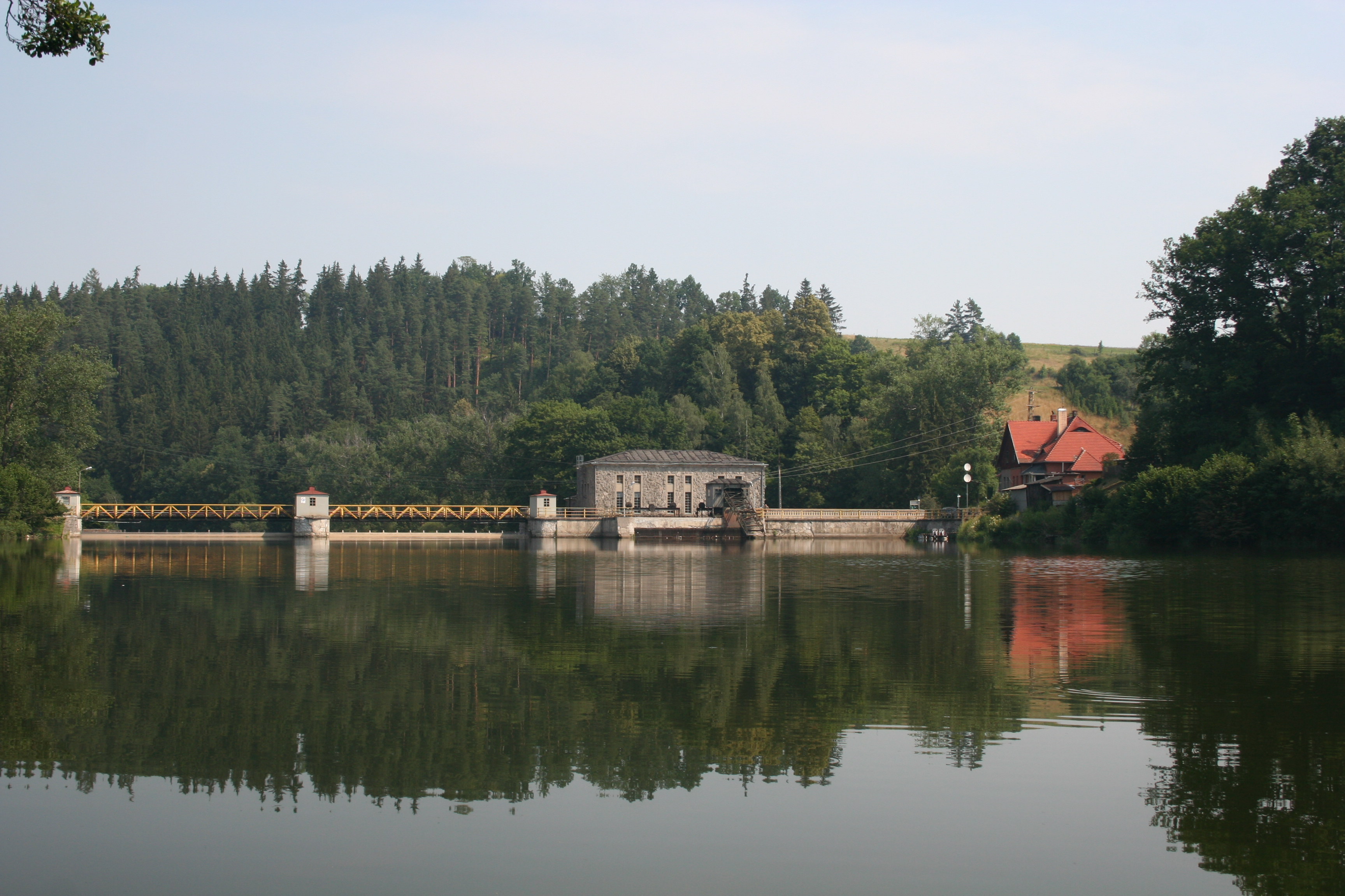 Wrzeszczyn Lake on Bóbr river near Wrzeszczyn, Lower Silesia, Poland.